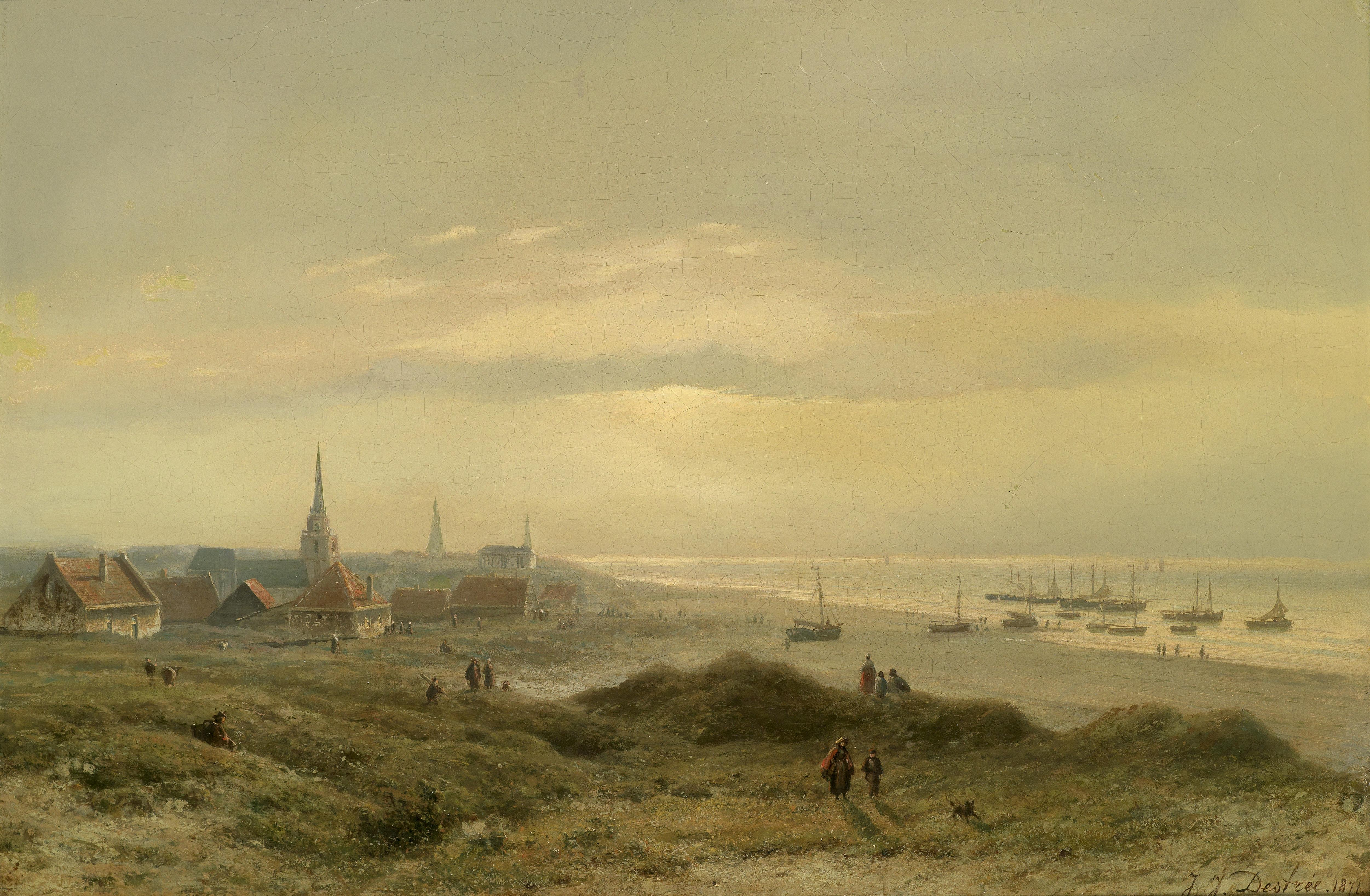 Strand bei Scheveningen, signiert, datiert, J. J. Destrée 1871, Öl auf Leinwand, 50,5 x 75,5 cm